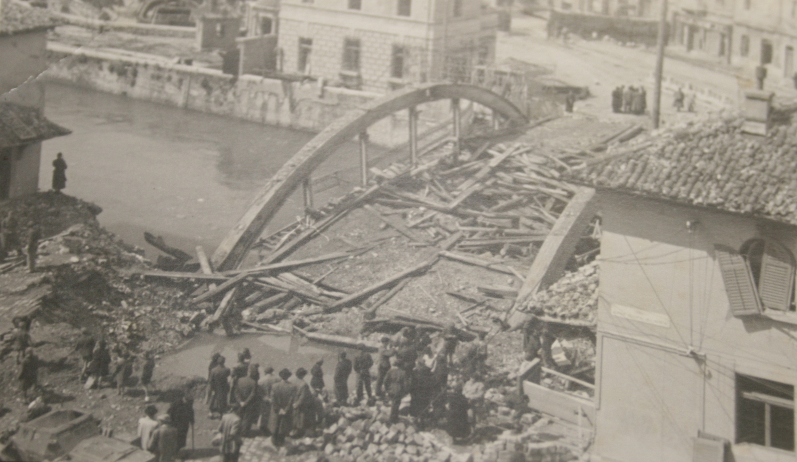 Most preko Rječine između Rijeke i Sušaka 1945. godine